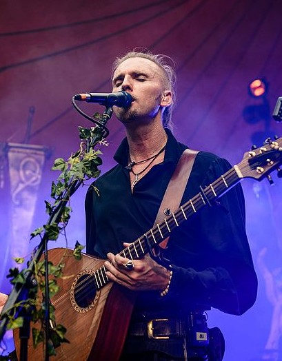 Oliver Sa Tyr